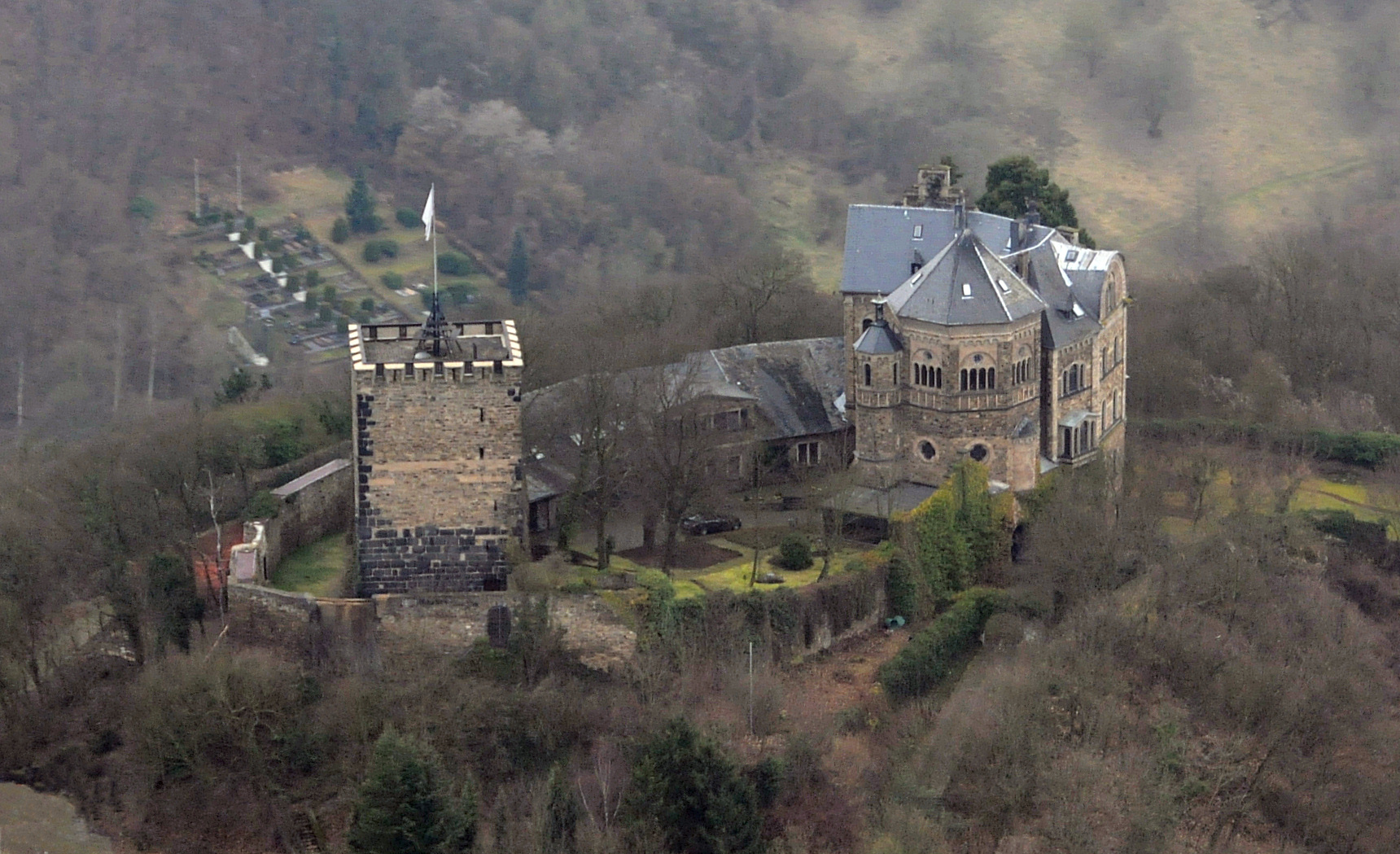 Luftbild der Burg Rheineck, Ansicht von Südosten